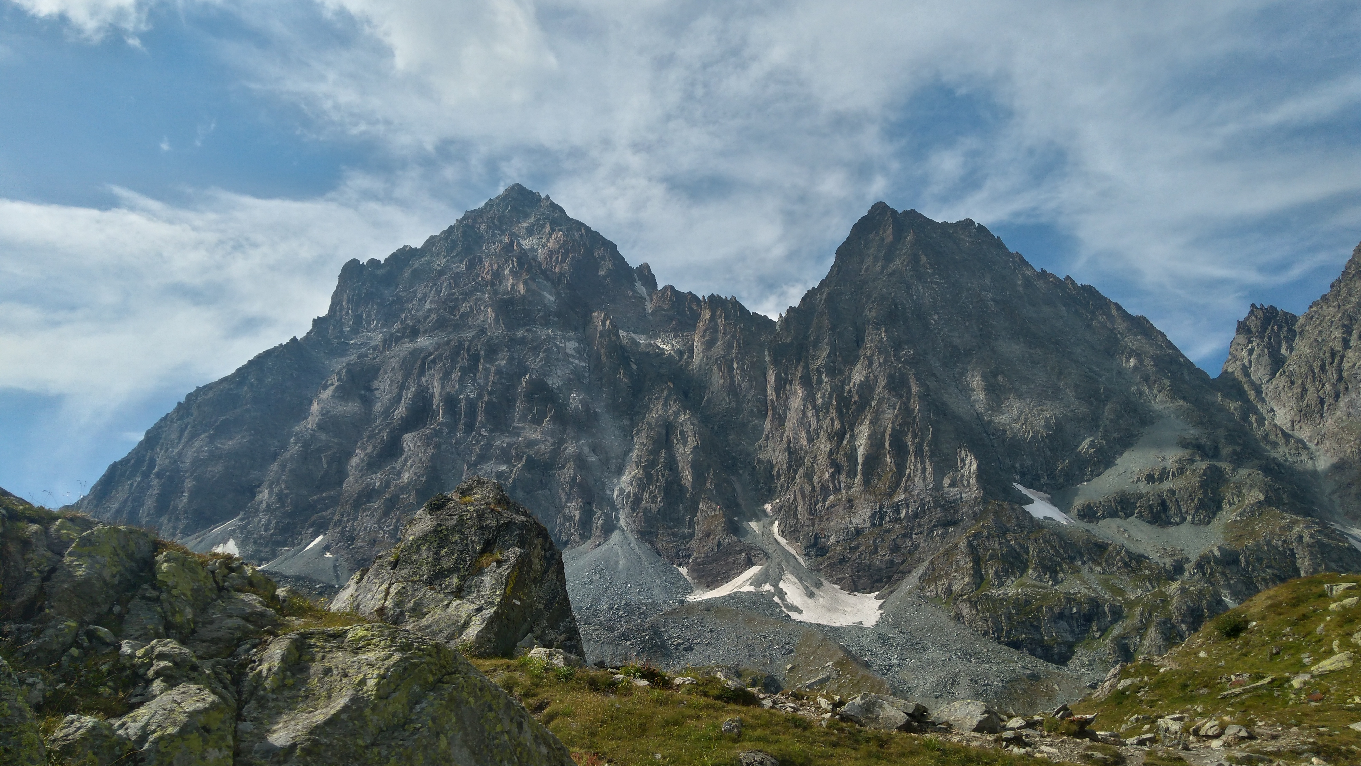 vista sul Monviso (sinistra) e il Viso lotto (destra)